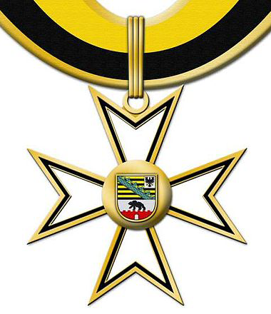 Der Verdienstorden des Landes Sachsen-Anhalt